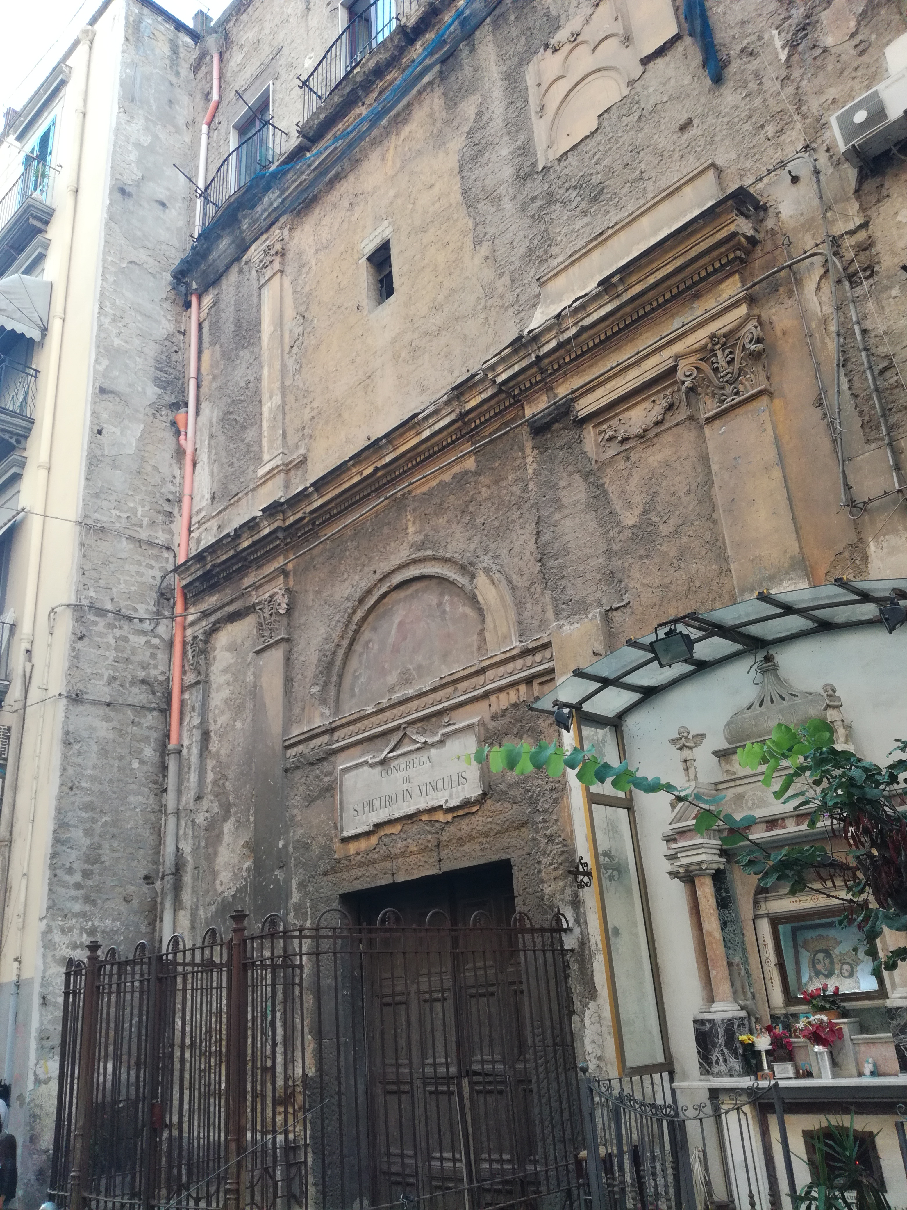 San Pietro in Vinculis (Napoli)